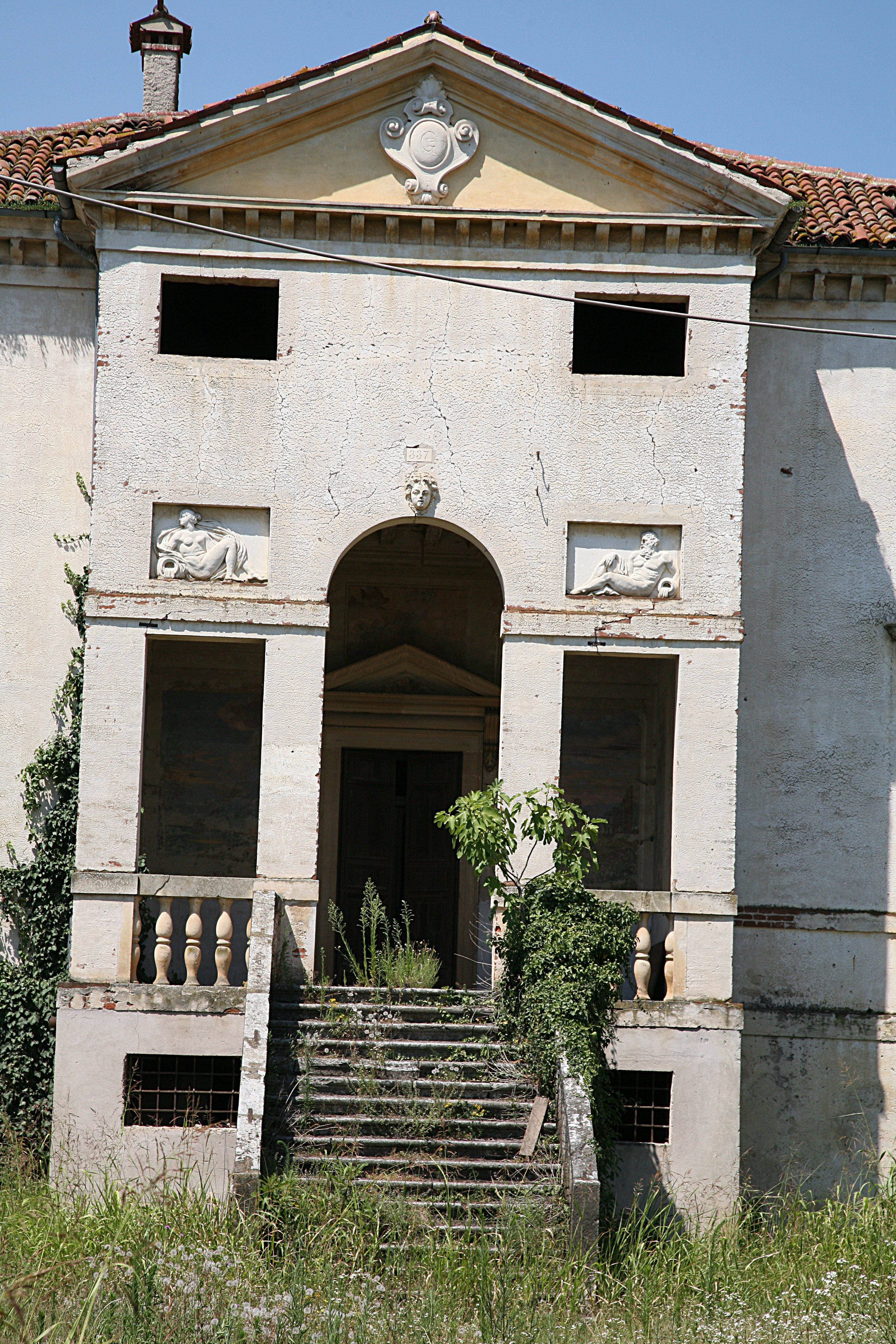 Villa Forni Cerato by Andrea Palladio.